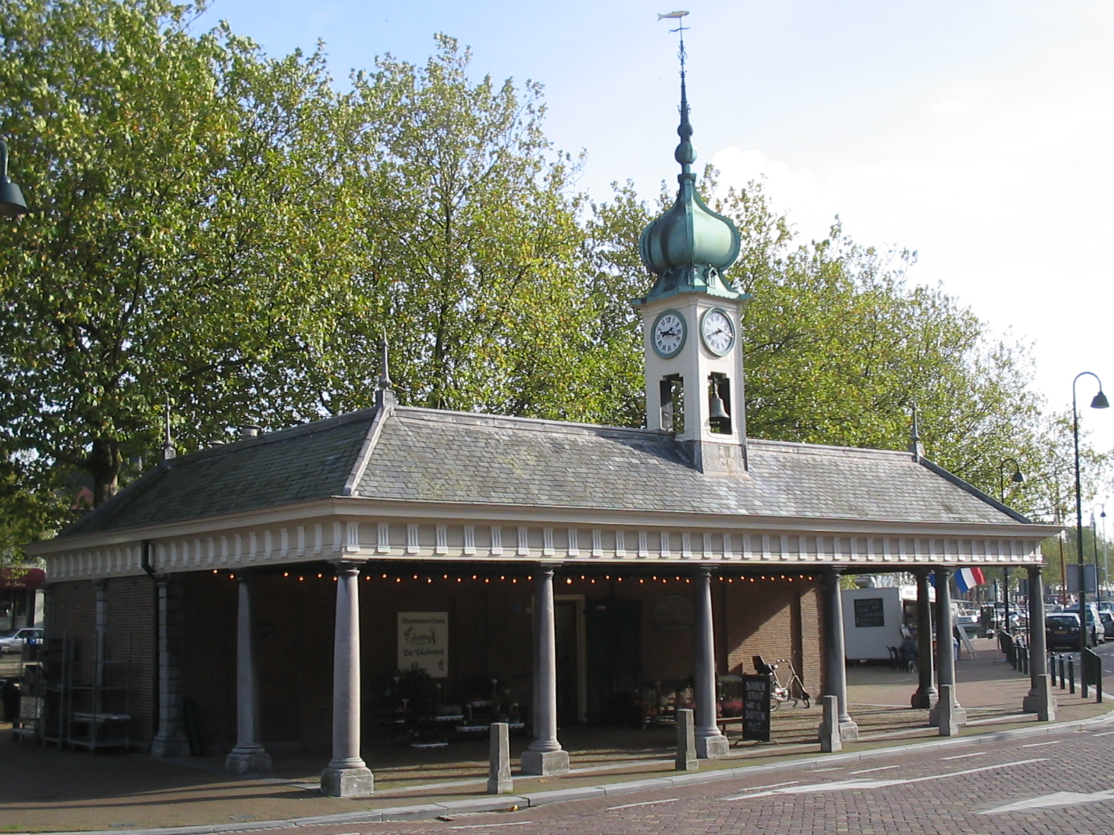 Visbank Vlaardingen, Netherlands (26 okt 2005)